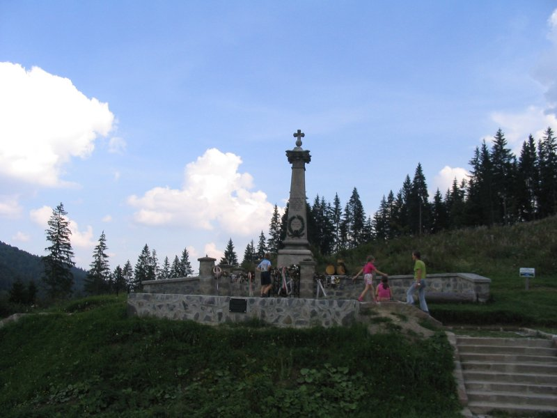 Nyergestető, 2005